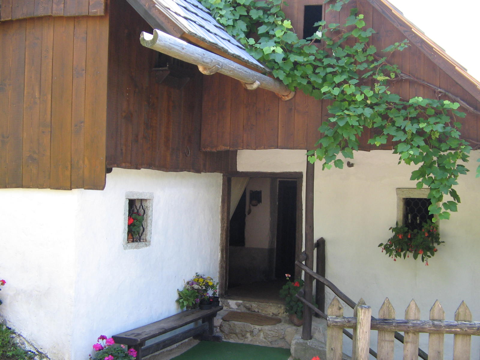 Quelle: eigene Aufnahme 19 08 2005 Fotograf: Janez Novak, Ljubljana, Slovenija